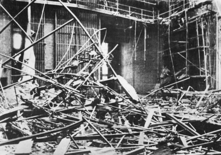 Dessau, Landestheater, Ruine, Foyer Eröffnung des Landesthaters in Dessau. Am 20.8.49 wurde das Landestheater von Dessau wiedereröffnet und damit die größte und modernste Bühne Deutschlands der Öffentlichkeit übergeben. UBz: Das zerstörte Foyer vor Beginn der Aufbauarbeiten. Aufn.: Zentralbild Ho. 22.8.49